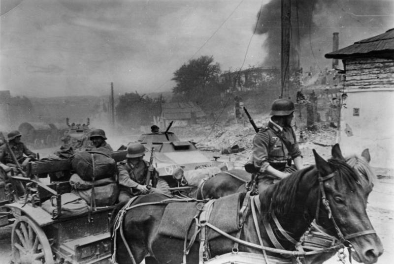 Russland, bespannte Artillerie in brennendem Ort Rußland, Der Weg ist freigekämpft. Hartnäckig verteidigter sowjetischer Widerstandspunkt, der im Feuer der vereinten Waffen zerschlagen wurde. Der Feind ist geflüchtet, die Verfolgung kann wieder aufgenommen werden. Bei Abdruck nennen: SS-PK-Roth-Scherl. 15.8.41 [Herausgabedatum] [Sowjetunion.- Bespannte Artillerie des Heeres beim Passieren einer brennende Ortschaft; Bildmitte: Panzerspähwagen der SS-Leibstandarte "Adolf Hitler"]